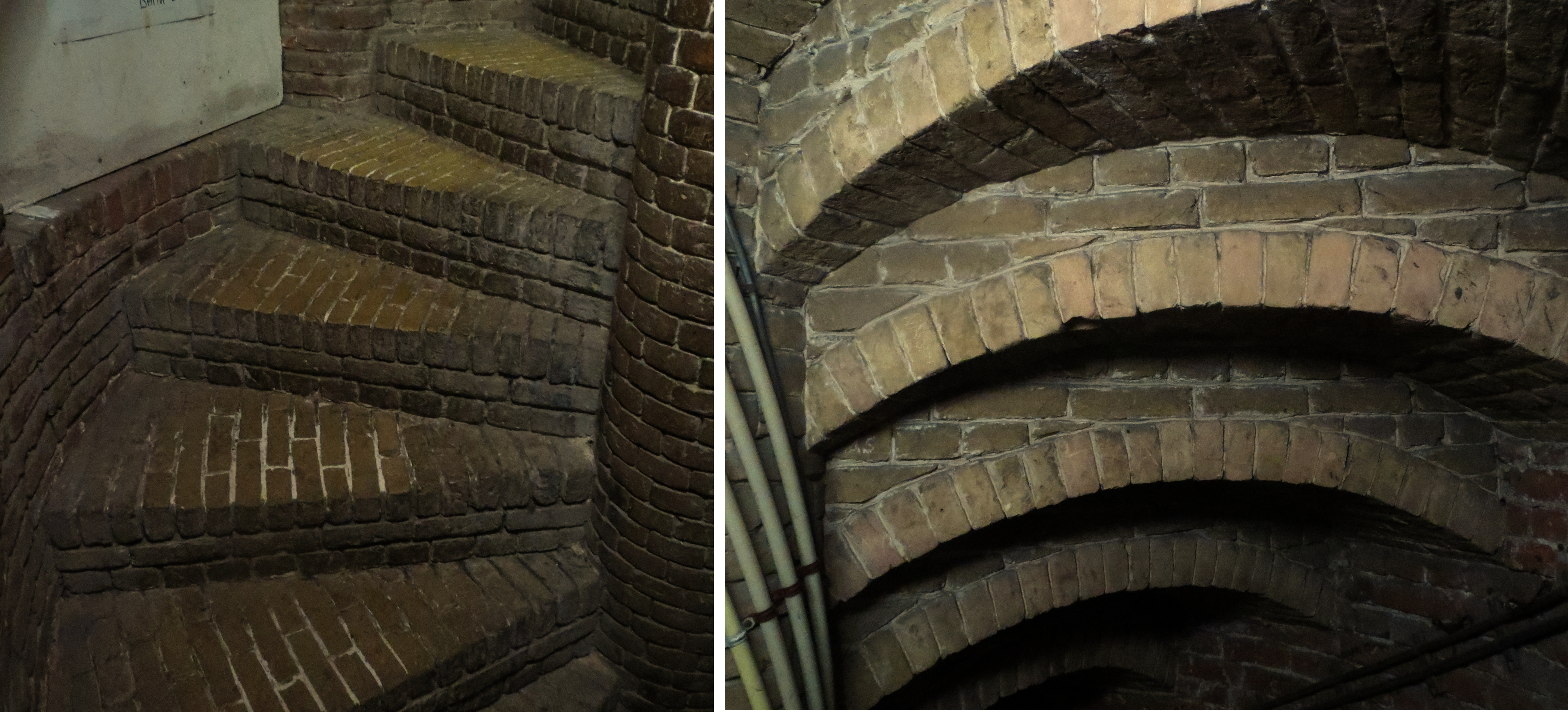 Oudenbosch Basilica gemetselde trap op boogjes